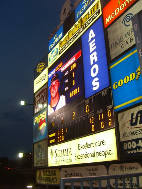 Canal Park 05:07, 27 August 2006 . . Nick81aku . . 480×640 (86 KB)